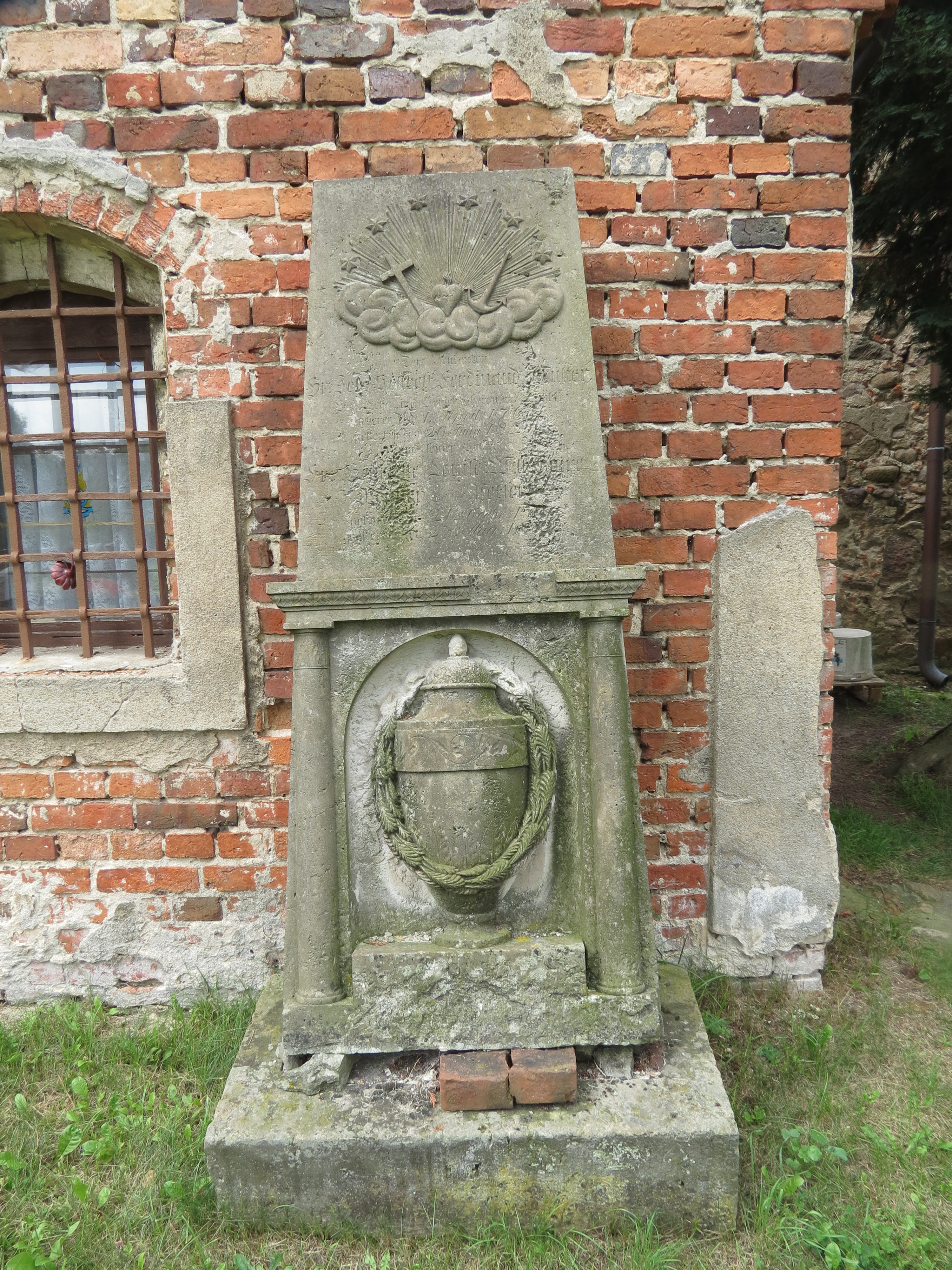 Grabmal des Johann Gotthelf Ferdinand Müller an derSüdseite der Dorfkirche Laubst, Ortsteil der Stadt Drebkau, Landkreis Spree-Neiße, Brandenburg